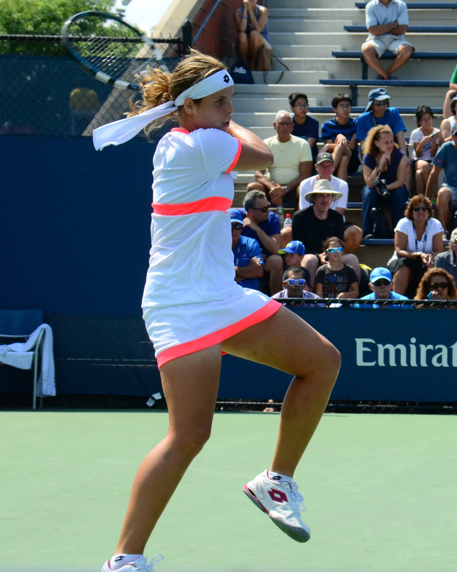 Maria Joao Koehler